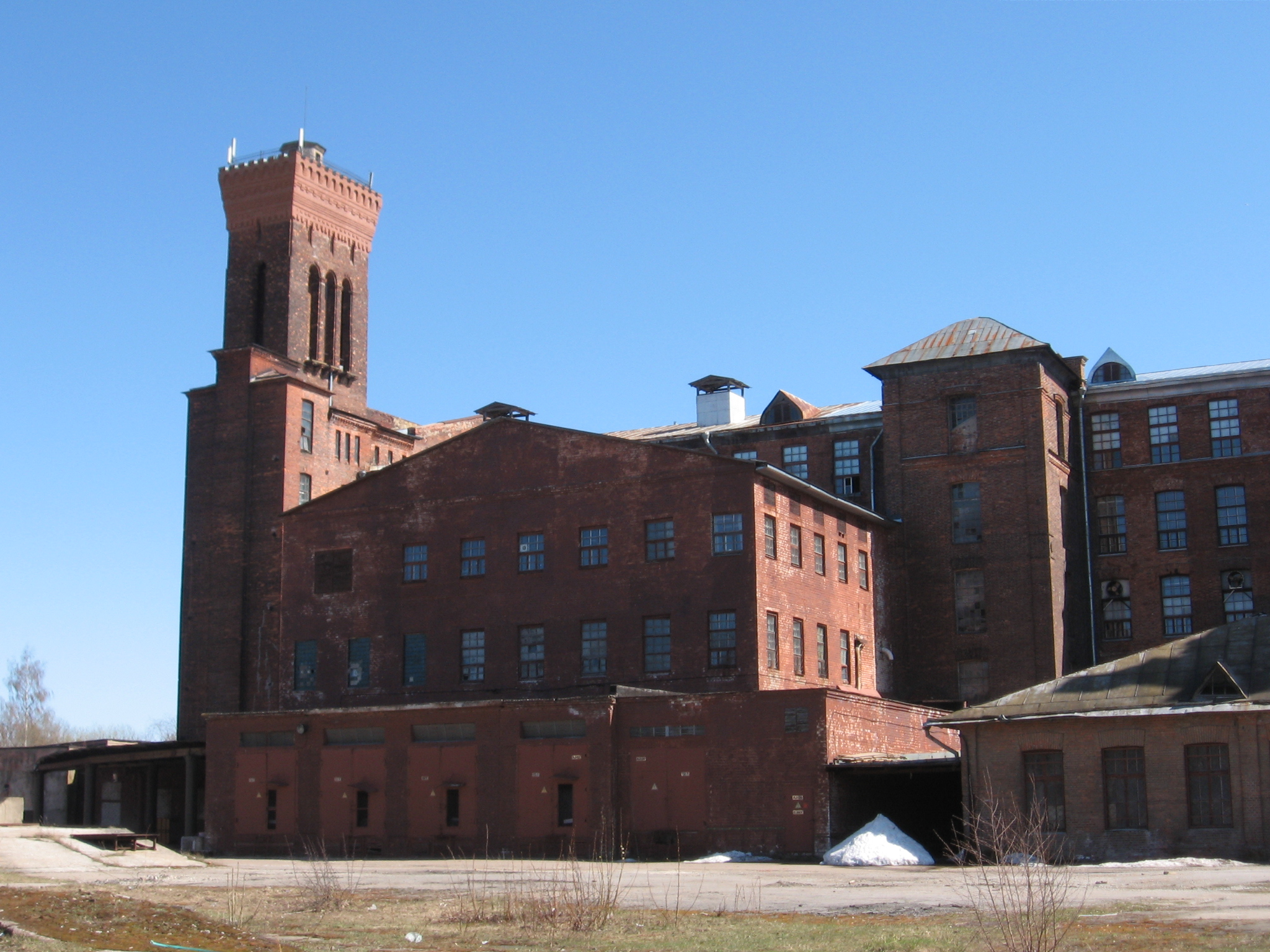 Kreenholmi Joala vabriku hoone